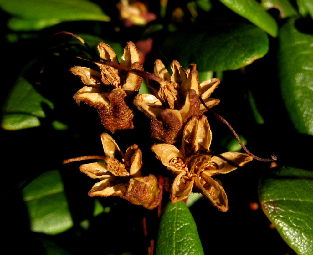 Раскрывшиеся плоды с семенами рододендрона золотистого (Rhododendron aureum). Западный Саян, парк "Ергаки".